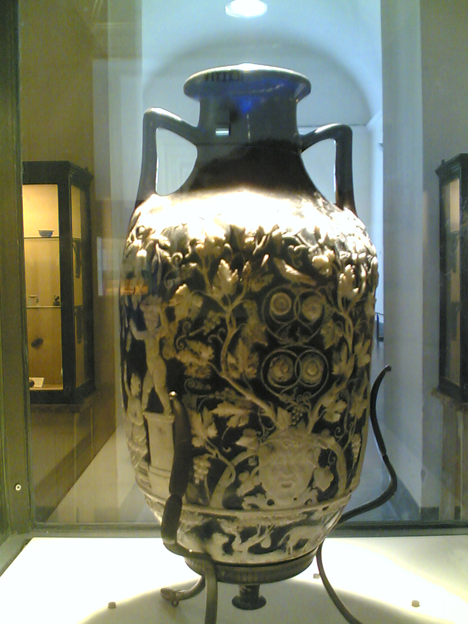 Vaso blu del I secolo a.C. in vetro cammeo a doppio strato (uno azzurro scuro e l’altro bianco opaco). Vi è rappresentata una scena di carattere dionisiaco. Fu rinvenuto a Pompei il 29.12.1837. È attualmente esposto nel Museo archeologico nazionale di Napoli.